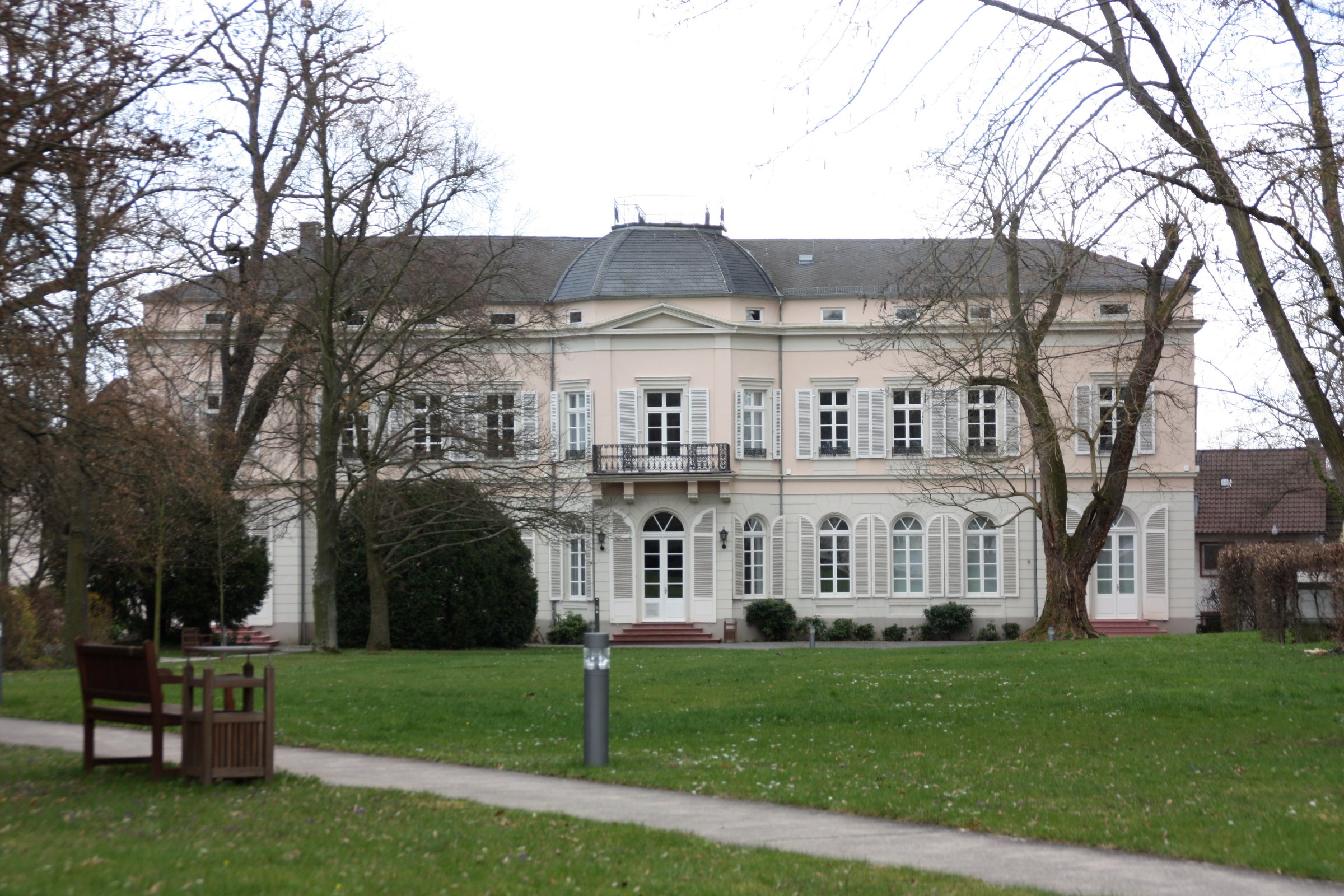 Der Kettenborn-Palais bei der Söhnlein-Sektkelterein in Schierstein, Wiesbaden, Hessen.